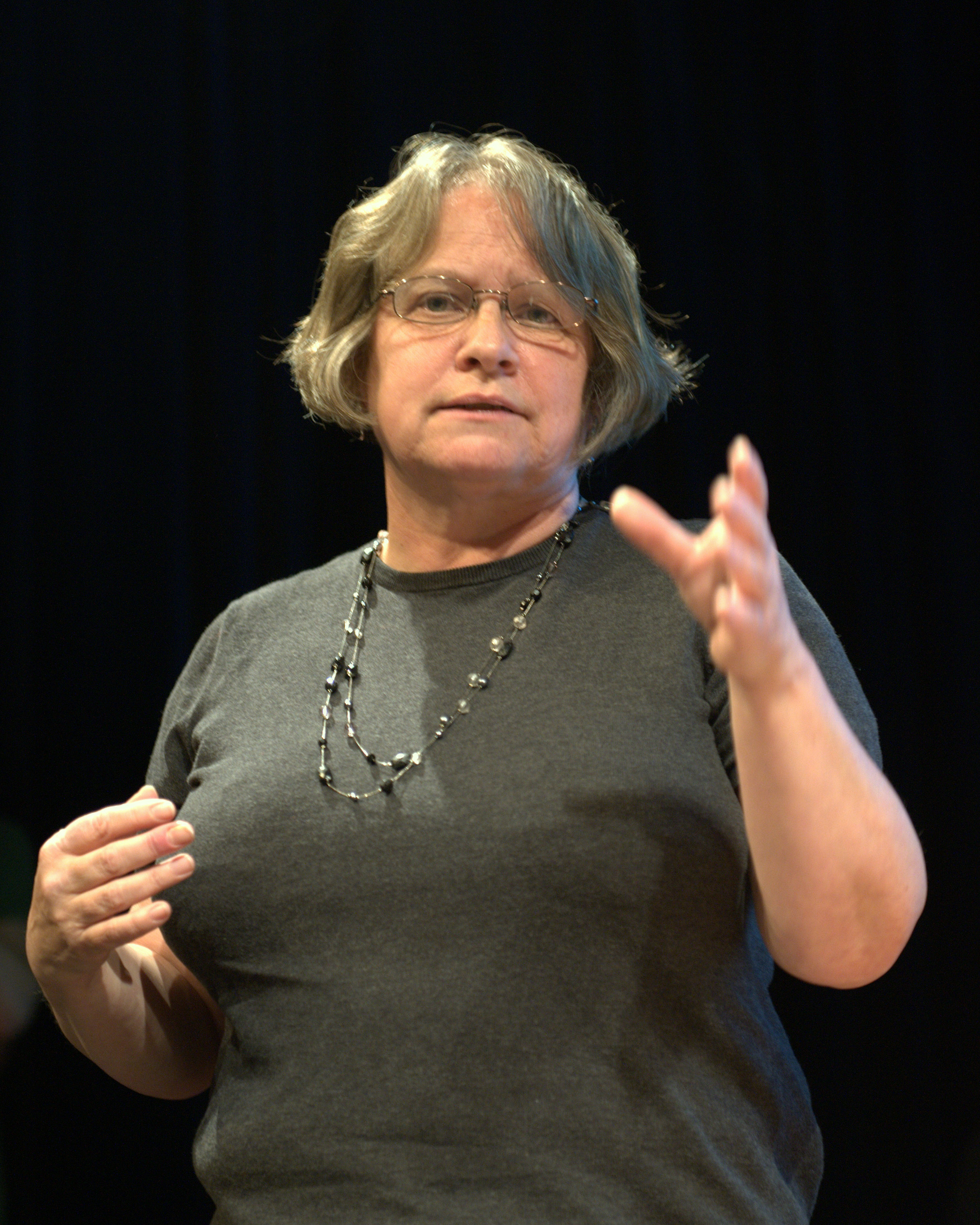 Lindsey German, Socialist Workers Party (Verenigd Koninkrijk)